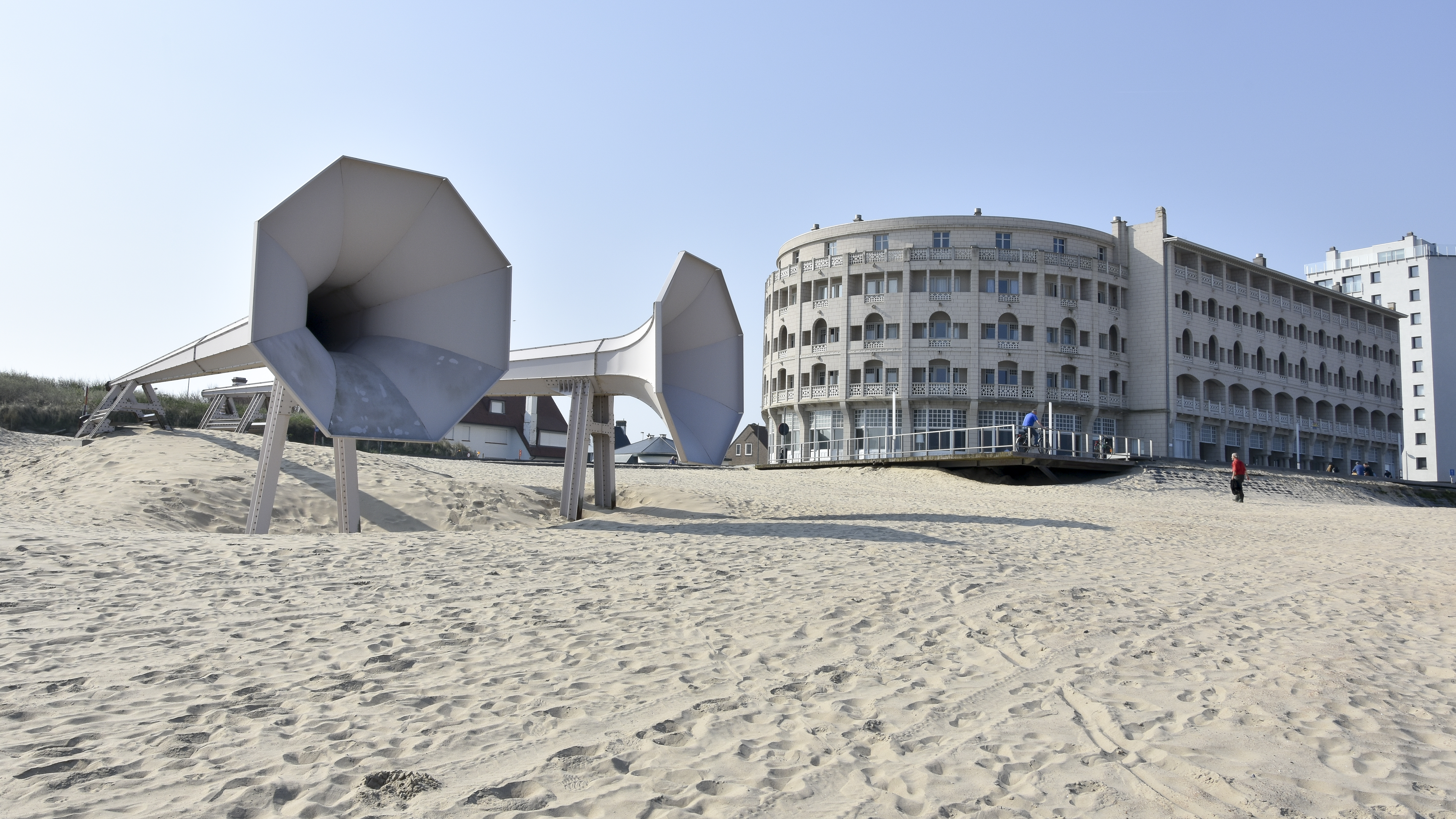 Ivars Drulle (1975) I Can Hear It - Westende